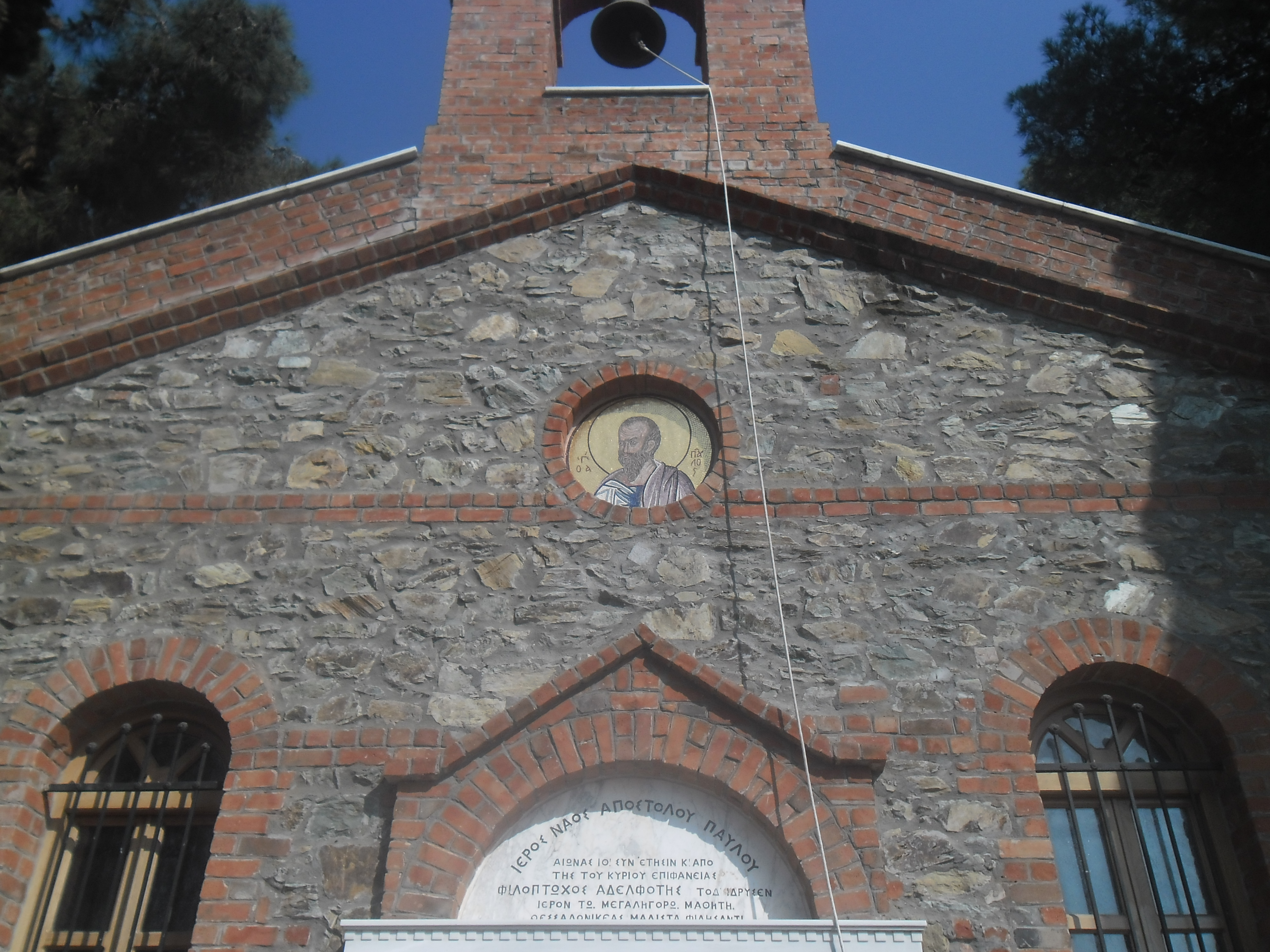 Thessaloniki